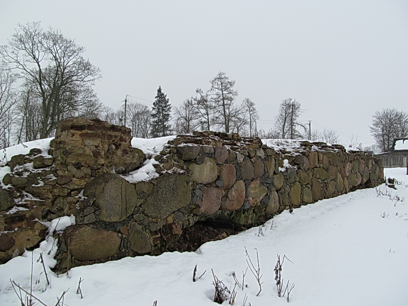 Лаздуны 1. Касцёл Святых Сымона і Тадэвуша